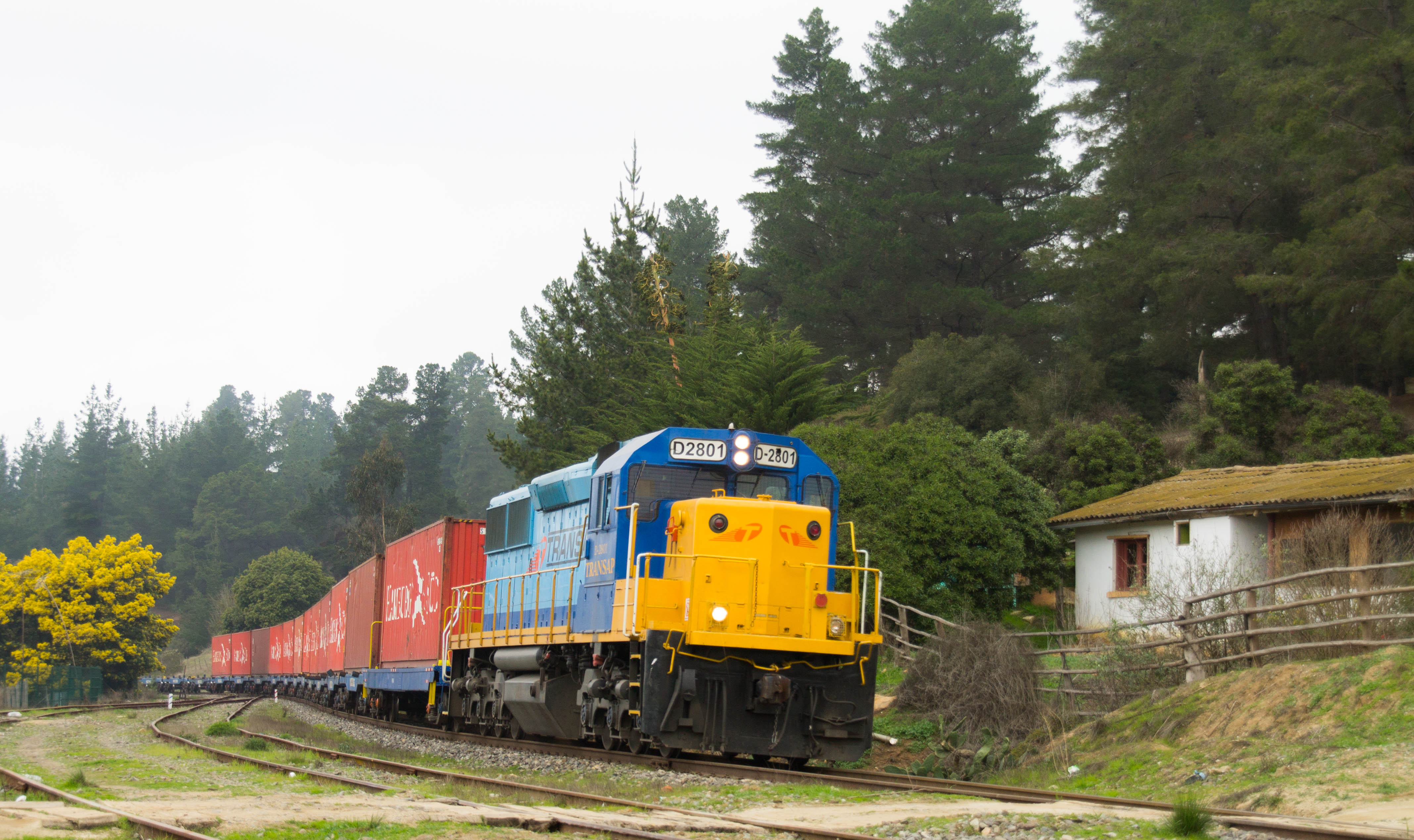 Transap y la nueva entretención para los ferros, con su trencillo de contenedores entre Lampa y Barrancas, servido en esta ocasión por la D-2801. Malvilla-Chile